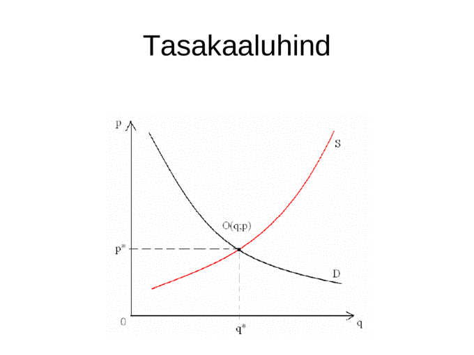 •S – nõudluse kõver; •D – pakkumise kõver; •p – hind; •q – kogus; •O (p* ja q* ristumiskoht) – tasakaaluhind.